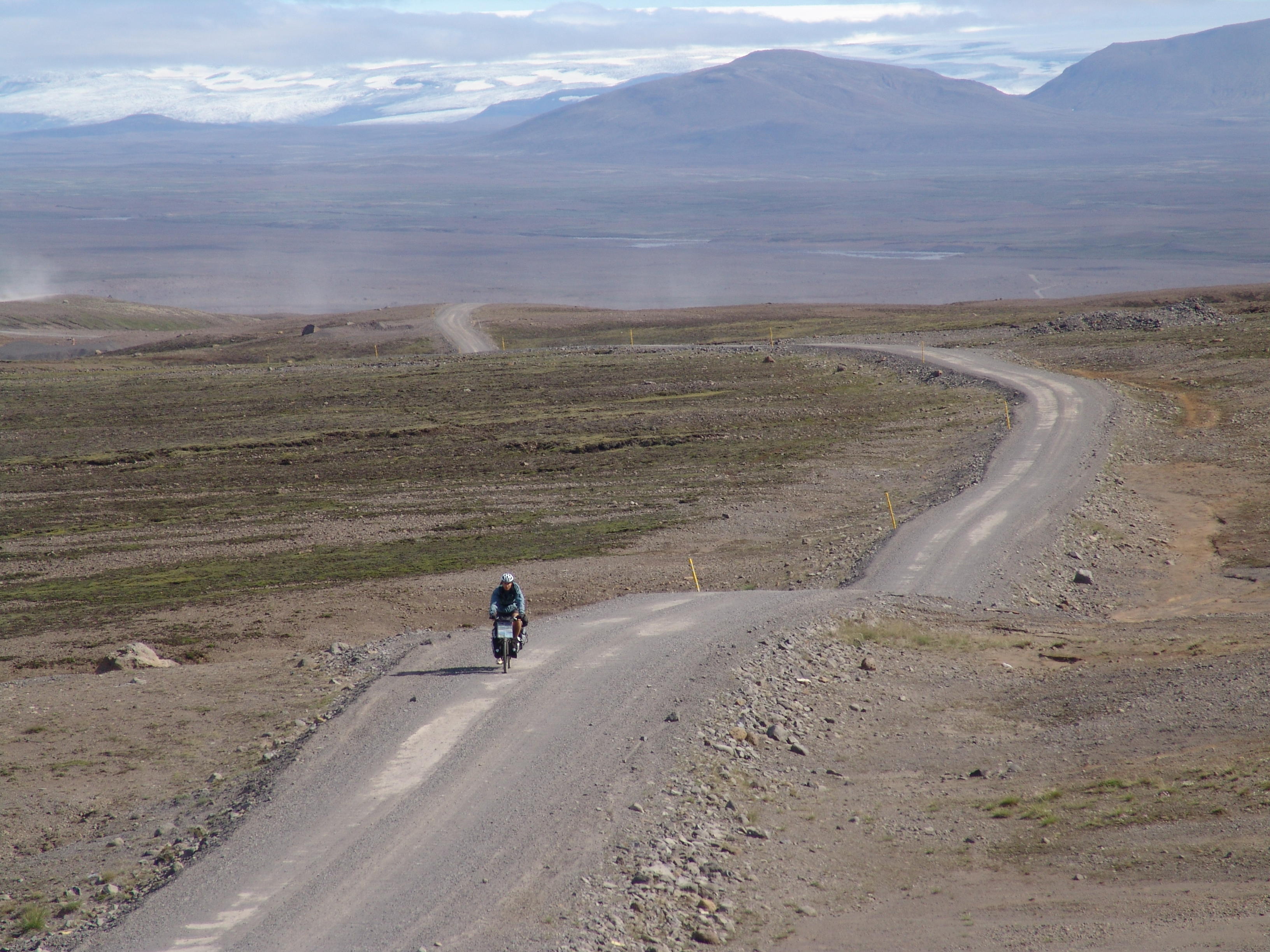 Island, Landschaft.